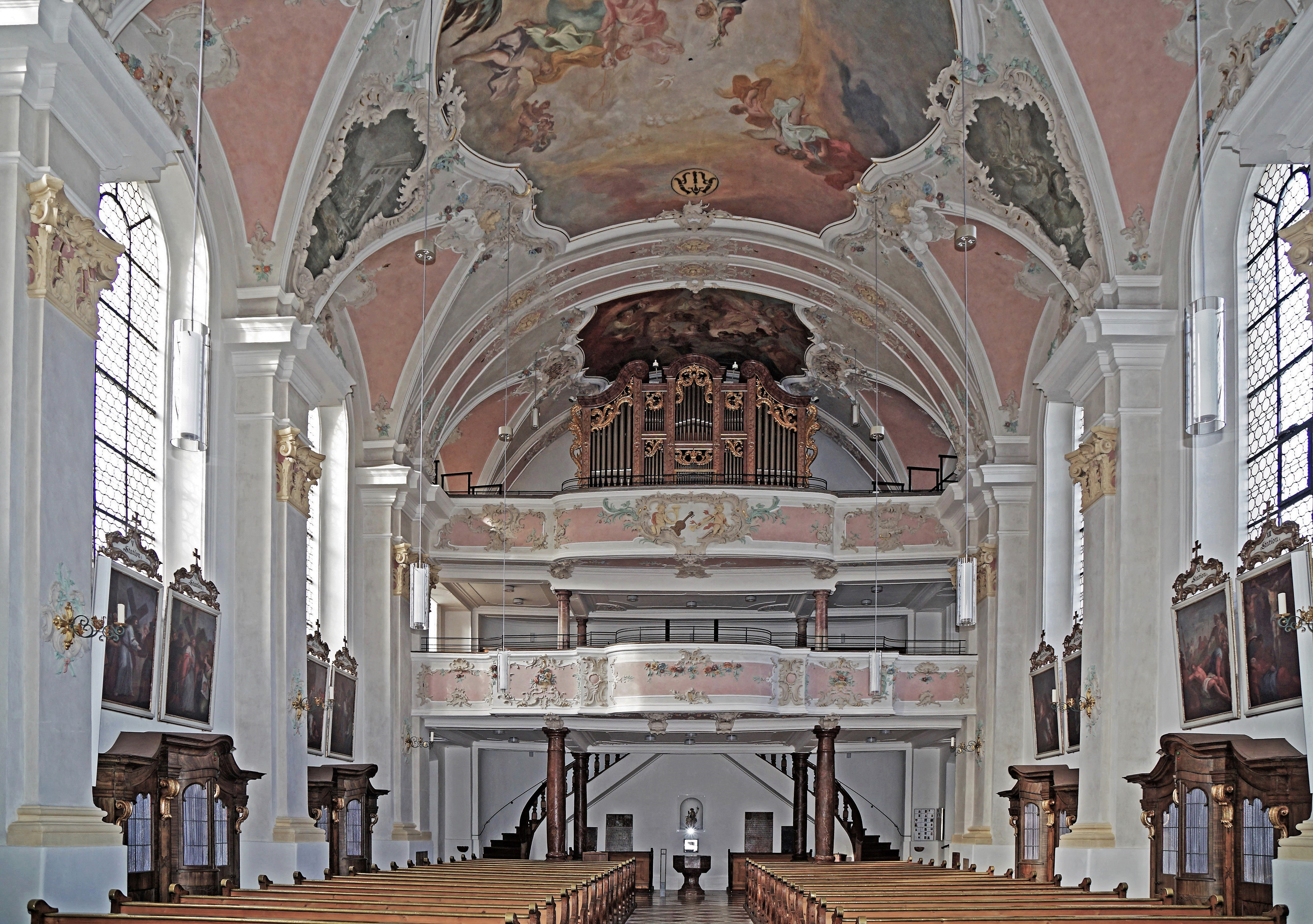 Pfarrkirche Mariä Himmelfahrt (Bad Aibling), Innenansicht gegen die Orgelempore